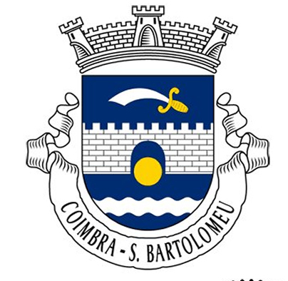 Brasão de Armas de São Bartolomeu